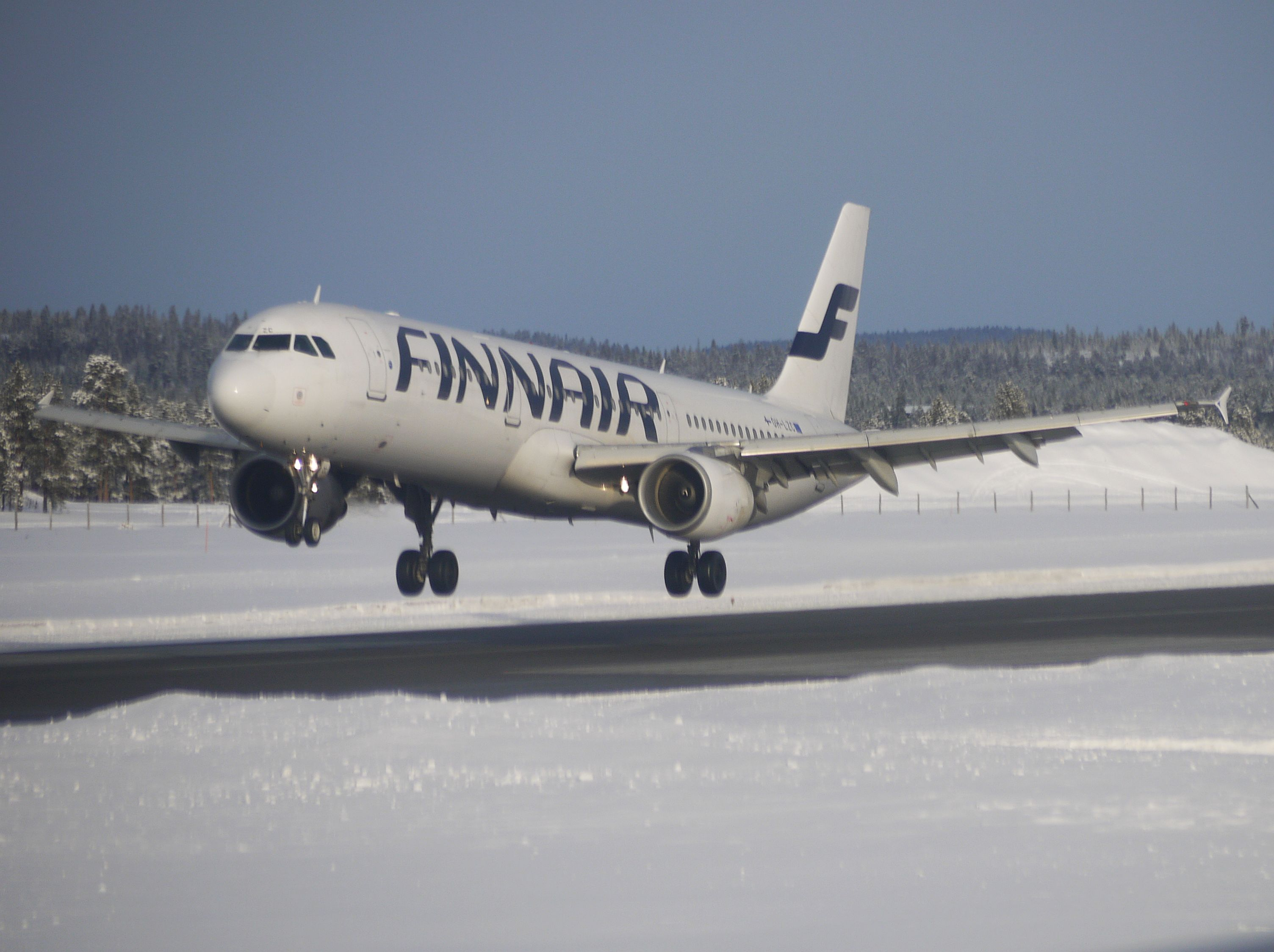 Finnairin Airbus A321 -matkustajakone laskeutuu Ivalon lentoasemalle helmikuussa 2017.